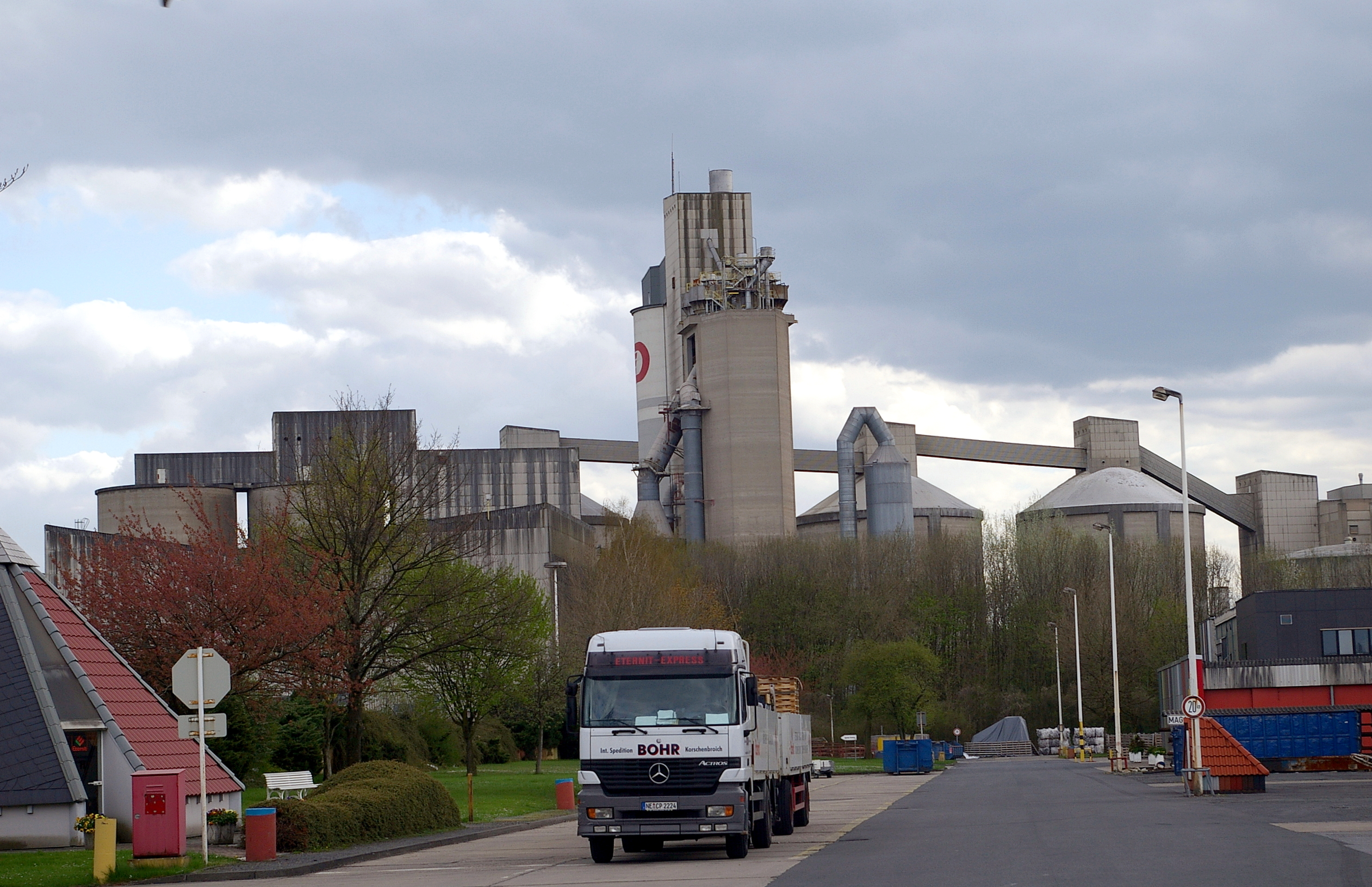 Silhouette eines Zementwerks (Beckum/Westfalen)